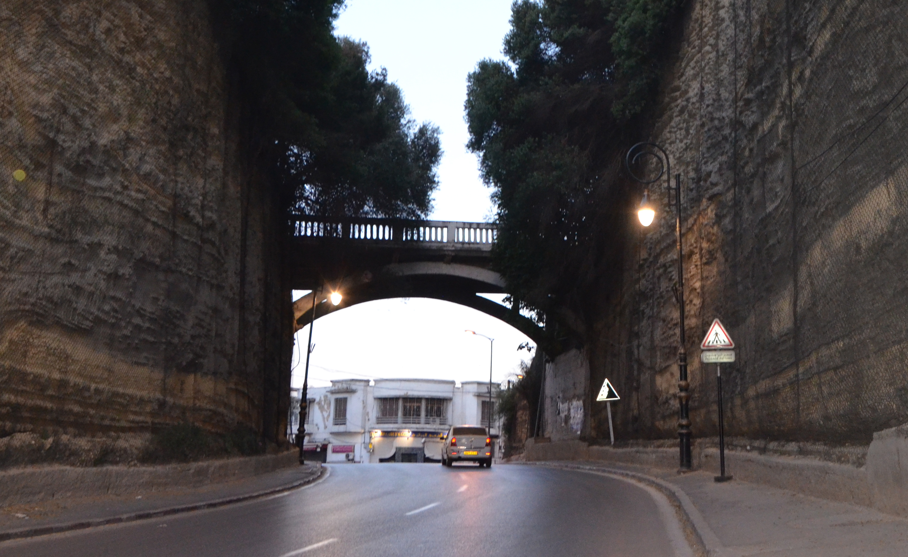 Entrée d'Hydra depuis la colonne Voirol